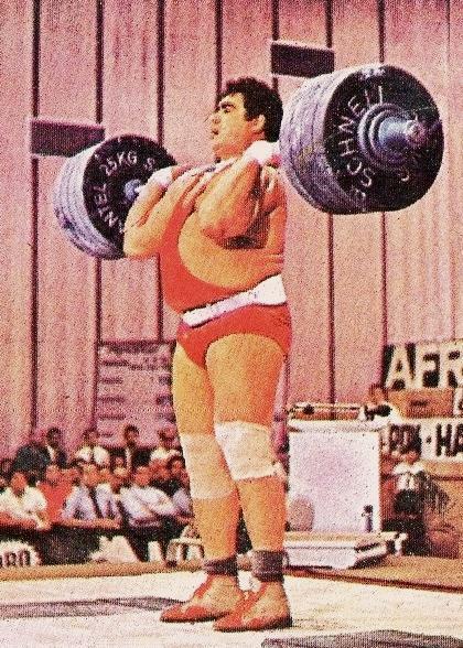 CAMPIONI dello SPORT MUNCHEN/MONACO '72-PANINI-Figurina n.49- ALEXEJEV-URSS-SOLL.PESI-Recuperata